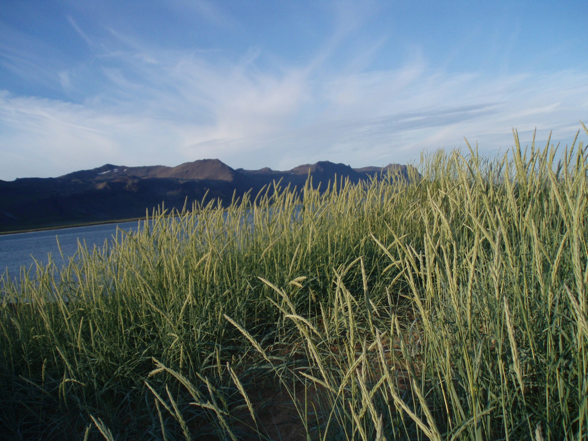 Leymus arenarius (de:) in Iceland